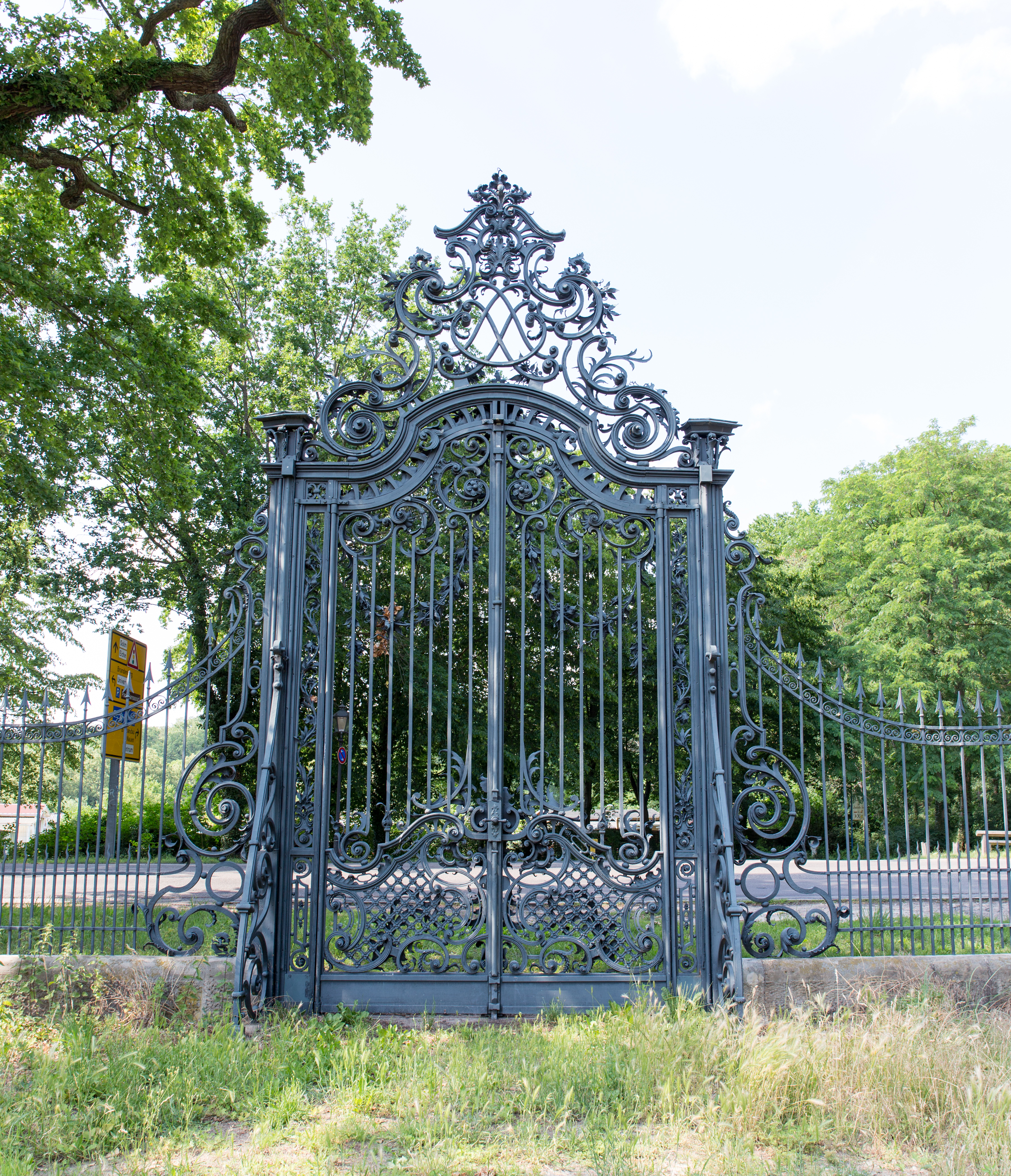 KulTour Parkanlage Sanssouci kleinerer Teil der Tore von der Weltausstellung